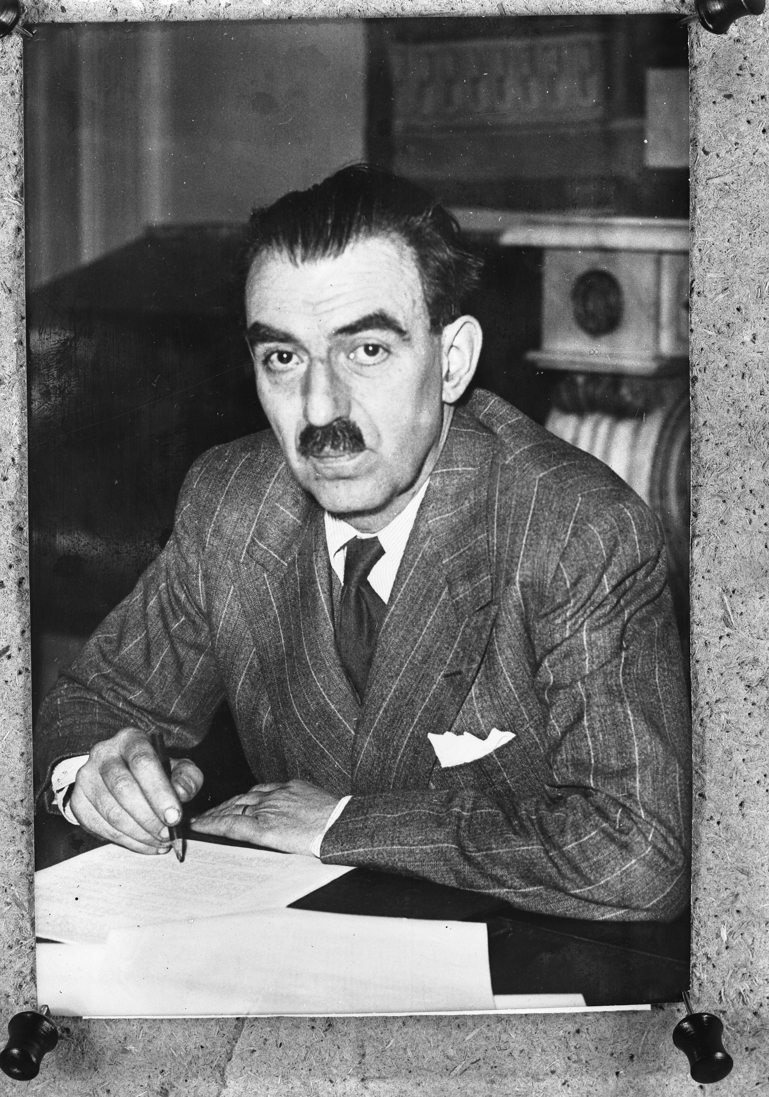 Collectie / Archief : Fotocollectie Anefo Reportage / Serie : [ onbekend ] Beschrijving : M. Andre Phillip Franse Minister van Financien Annotatie : Repronegatief Datum : 1 februari 1946 Persoonsnaam : phillip m andre Fotograaf : Agence France Presse (AFP) Auteursrechthebbende : Nationaal Archief Materiaalsoort : Glasnegatief Nummer archiefinventaris : bekijk toegang 2.24.01.09 Bestanddeelnummer : 901-4298